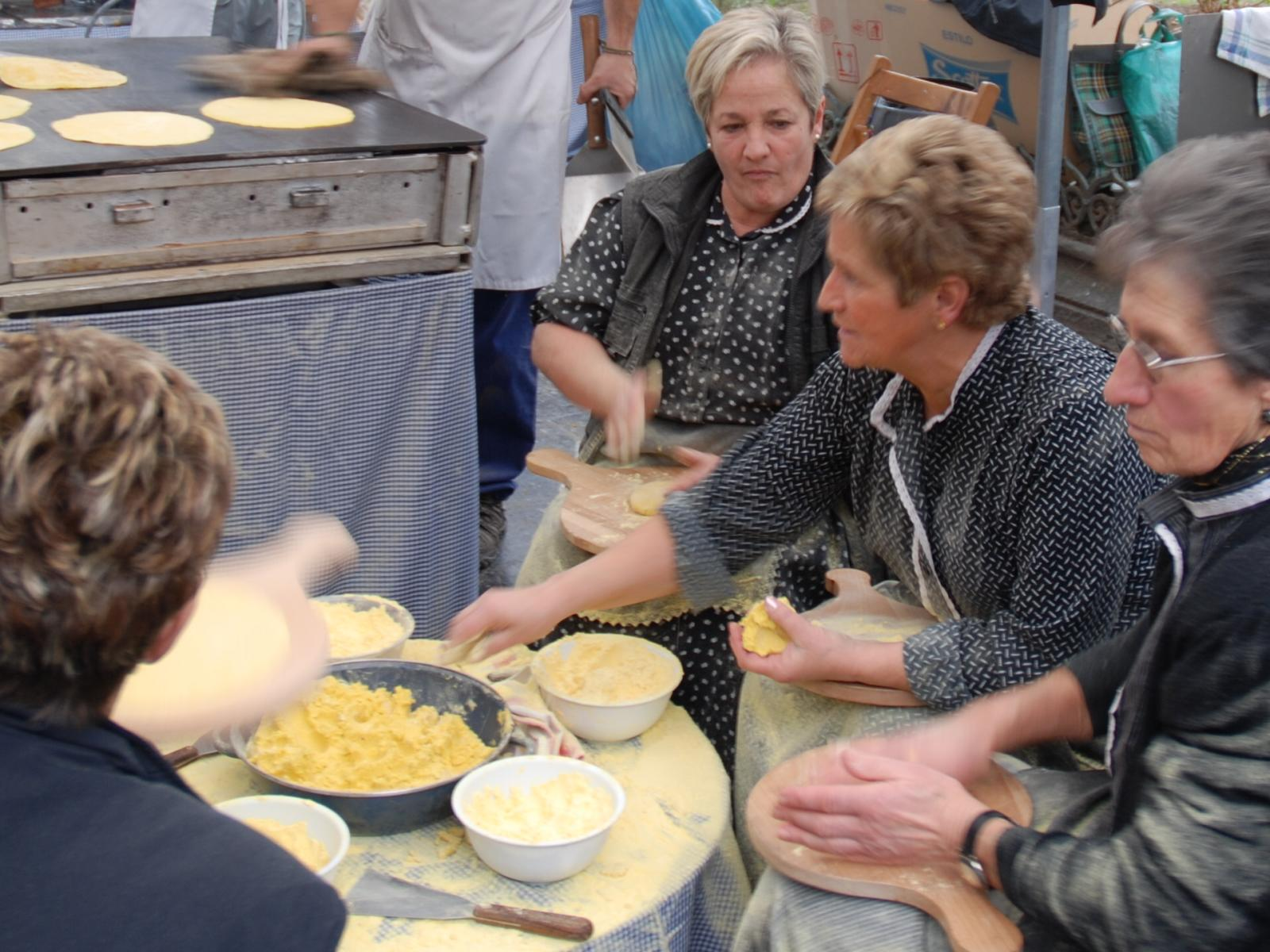 Taloak prestatzen, Donostiako san Tomas jaian.